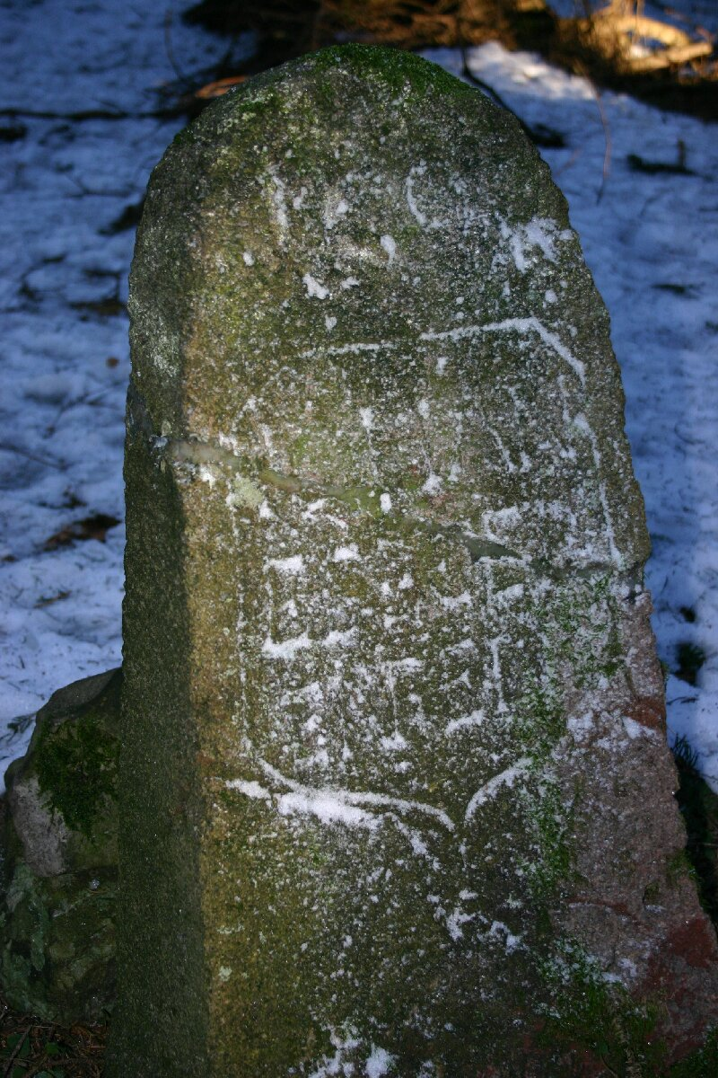 Schnadestein oberhalb Burbecke- Gericht Oedingen-Fredeburg-Bilstein